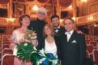 Violeta Dinescu, Marlos Nobre, Kilza Setti, Renato Mismetti, Maximiliano de Brito - Schlosstheater Schönbrunn, Vienna